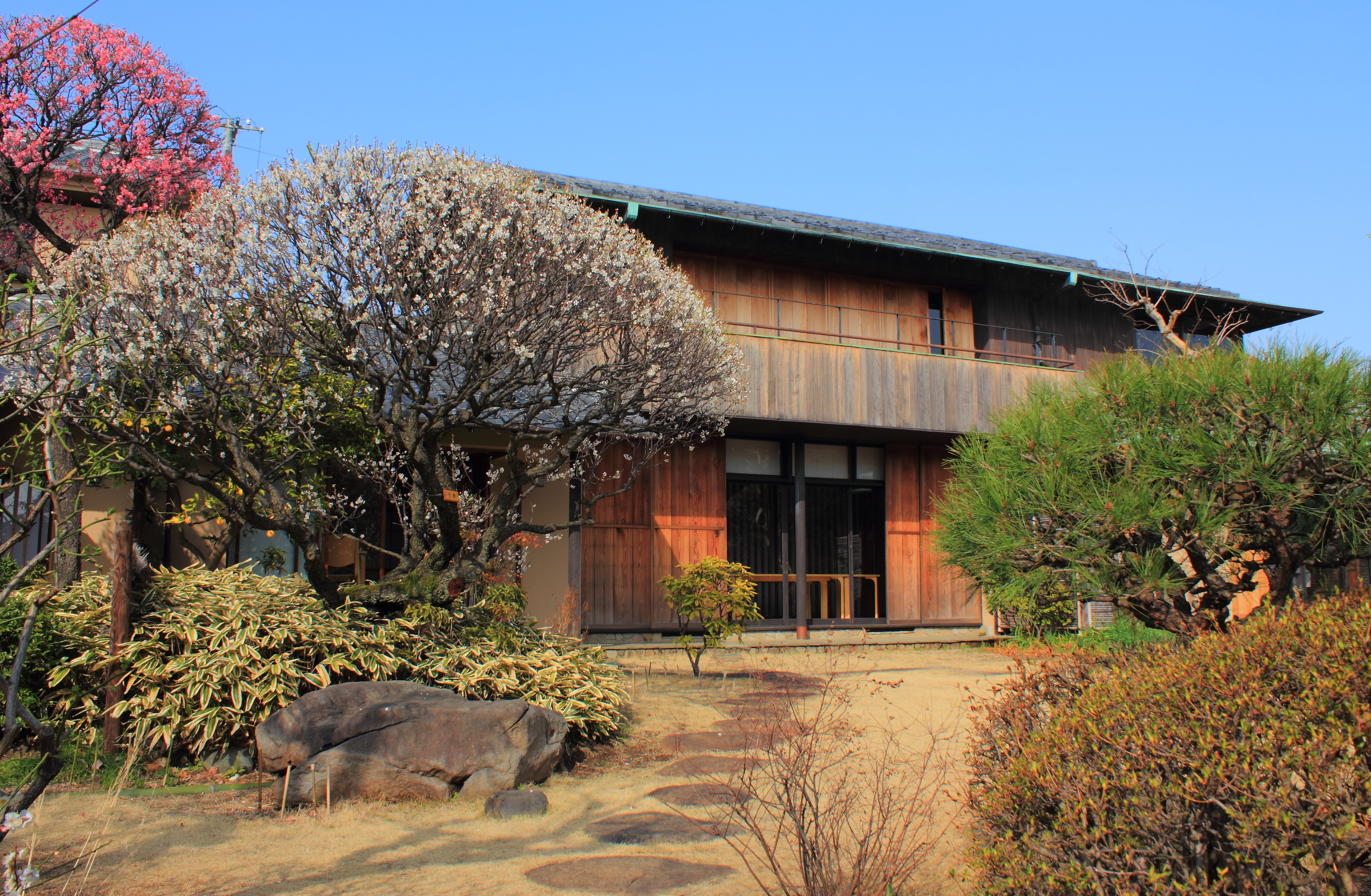 House in Tokyo Japan.杉並区立角川庭園、角川源義の元自邸（国の登録有形文化財）。